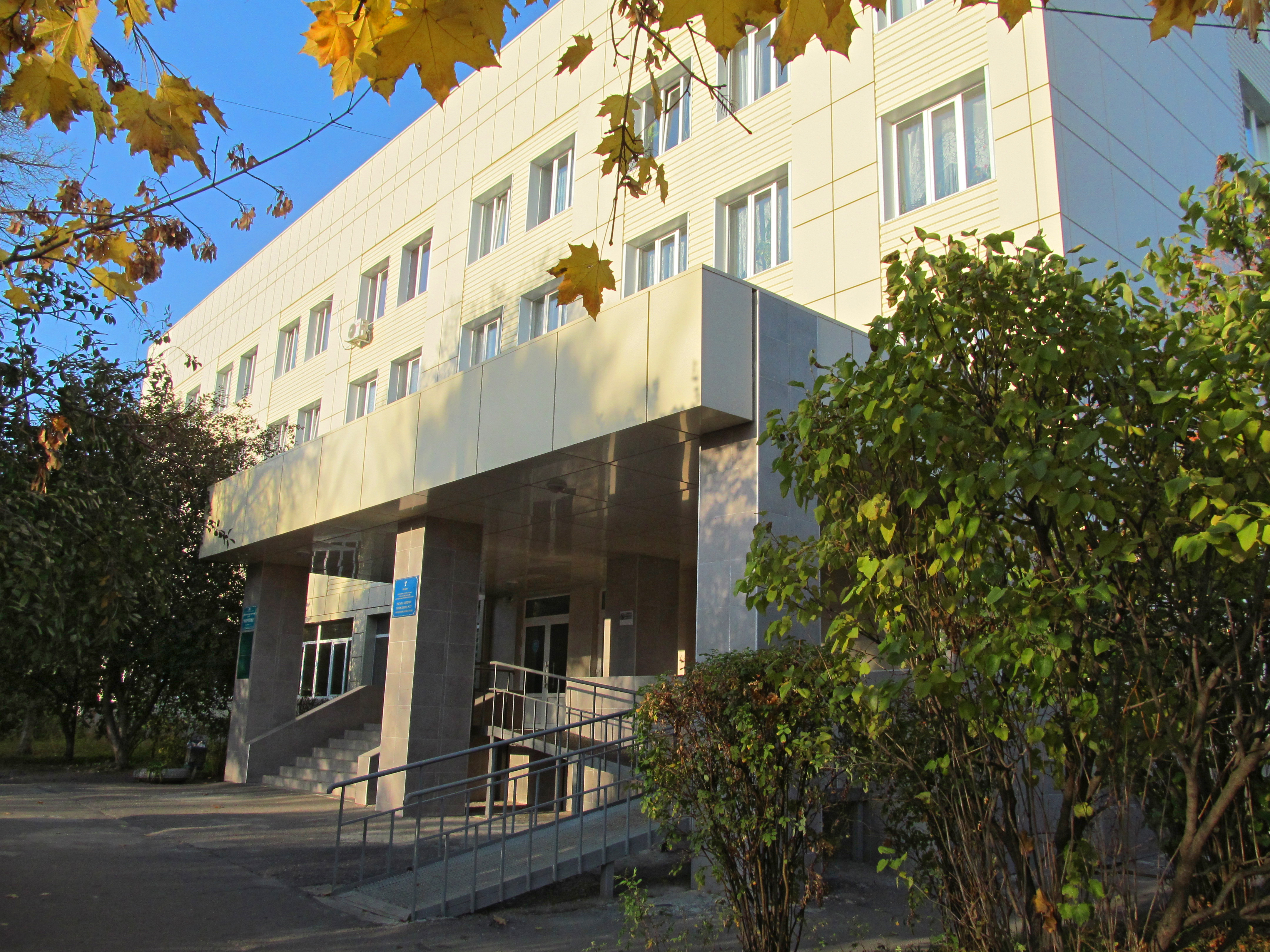 Харківська міська дитяча поліклініка №23. Вул. Шевченка, 133